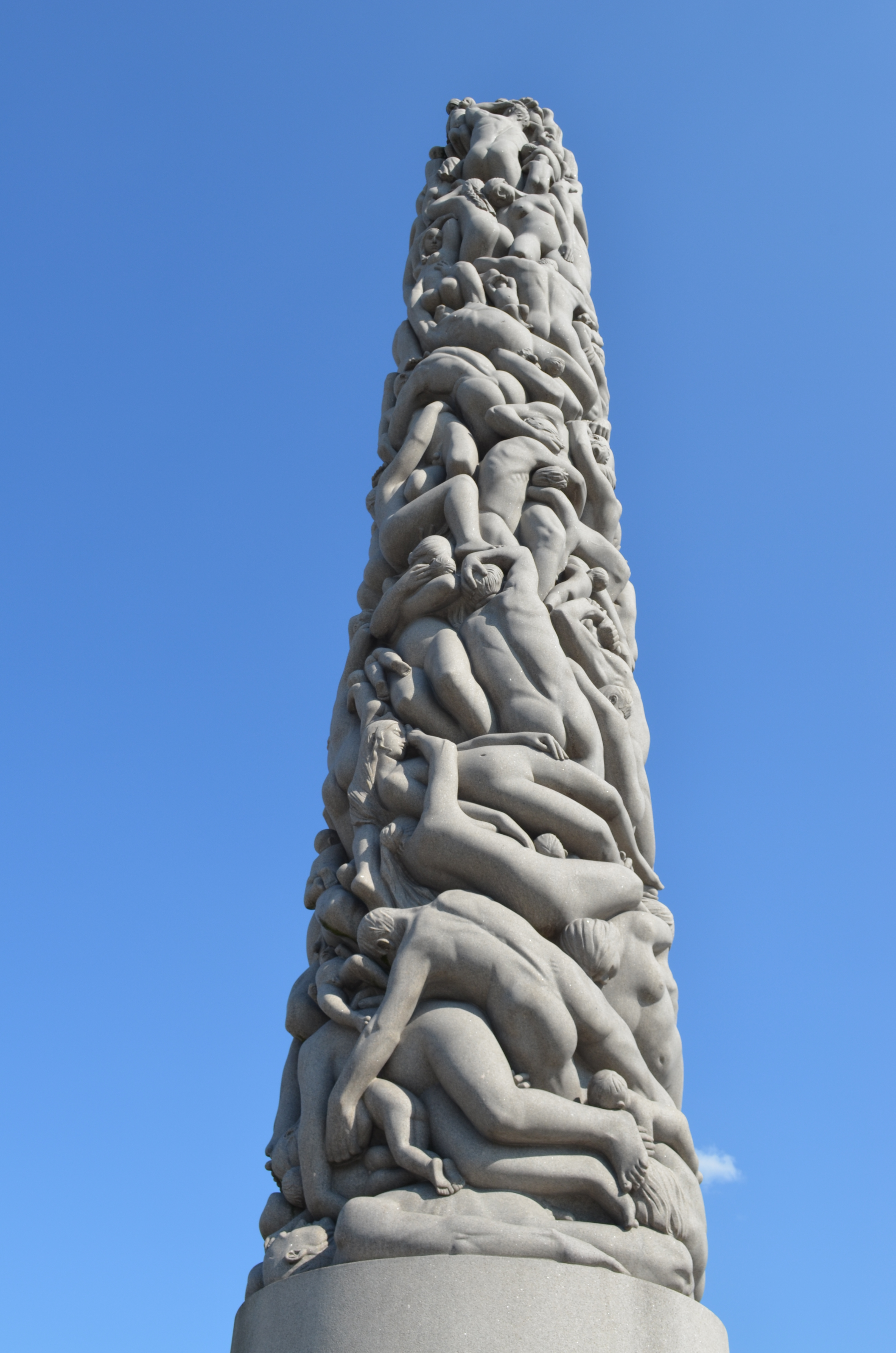 Frogner Park, Oslo